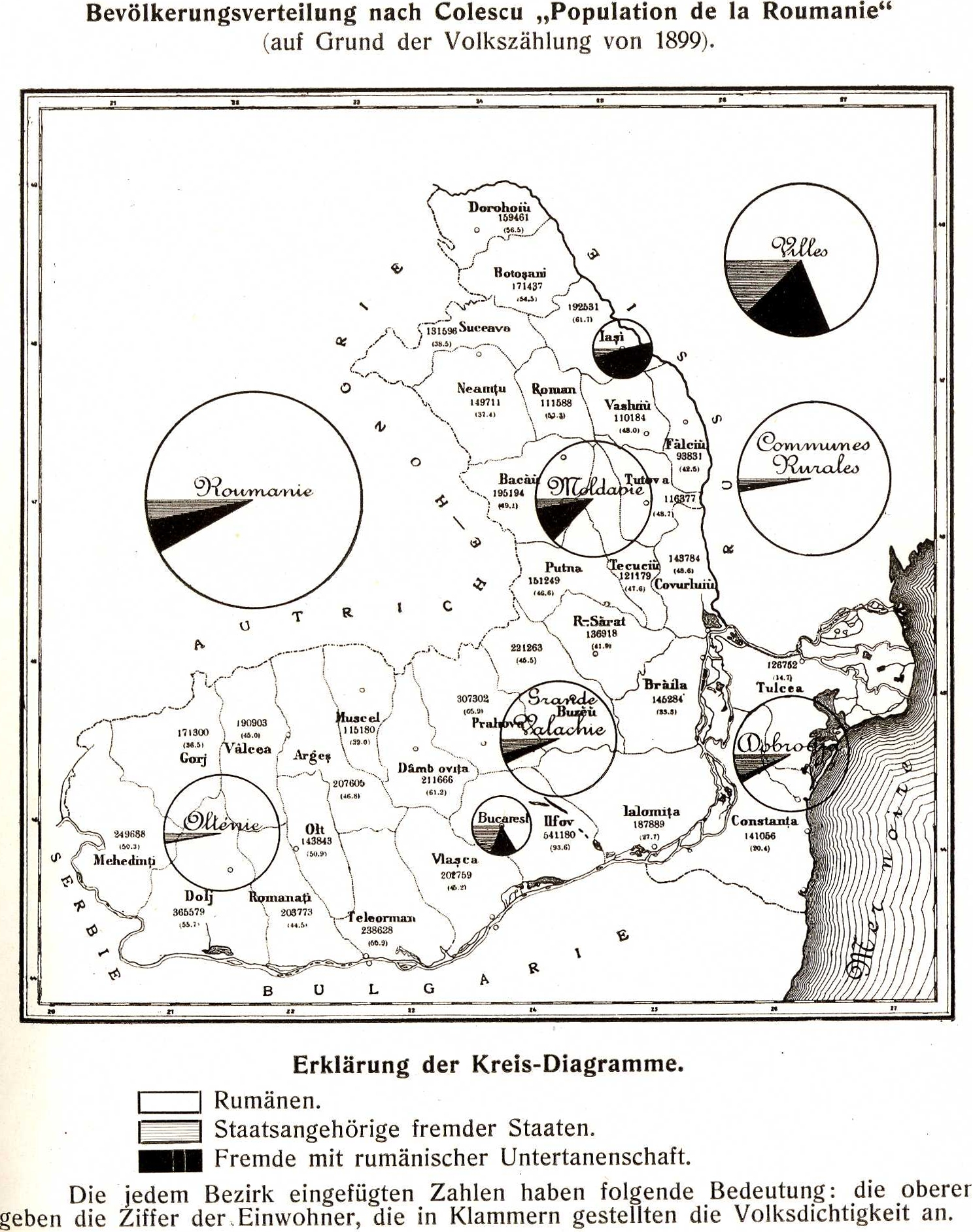 Harta distribuţiei populaţiei pe cetăţenie (nu etnie!) conform recensământului din 1899. Alb = cetăţeni români Gri = cetăţeni străini Negru=cetăţeni străini, dar supuşi ai statului român (cu şedere permanentă în România)